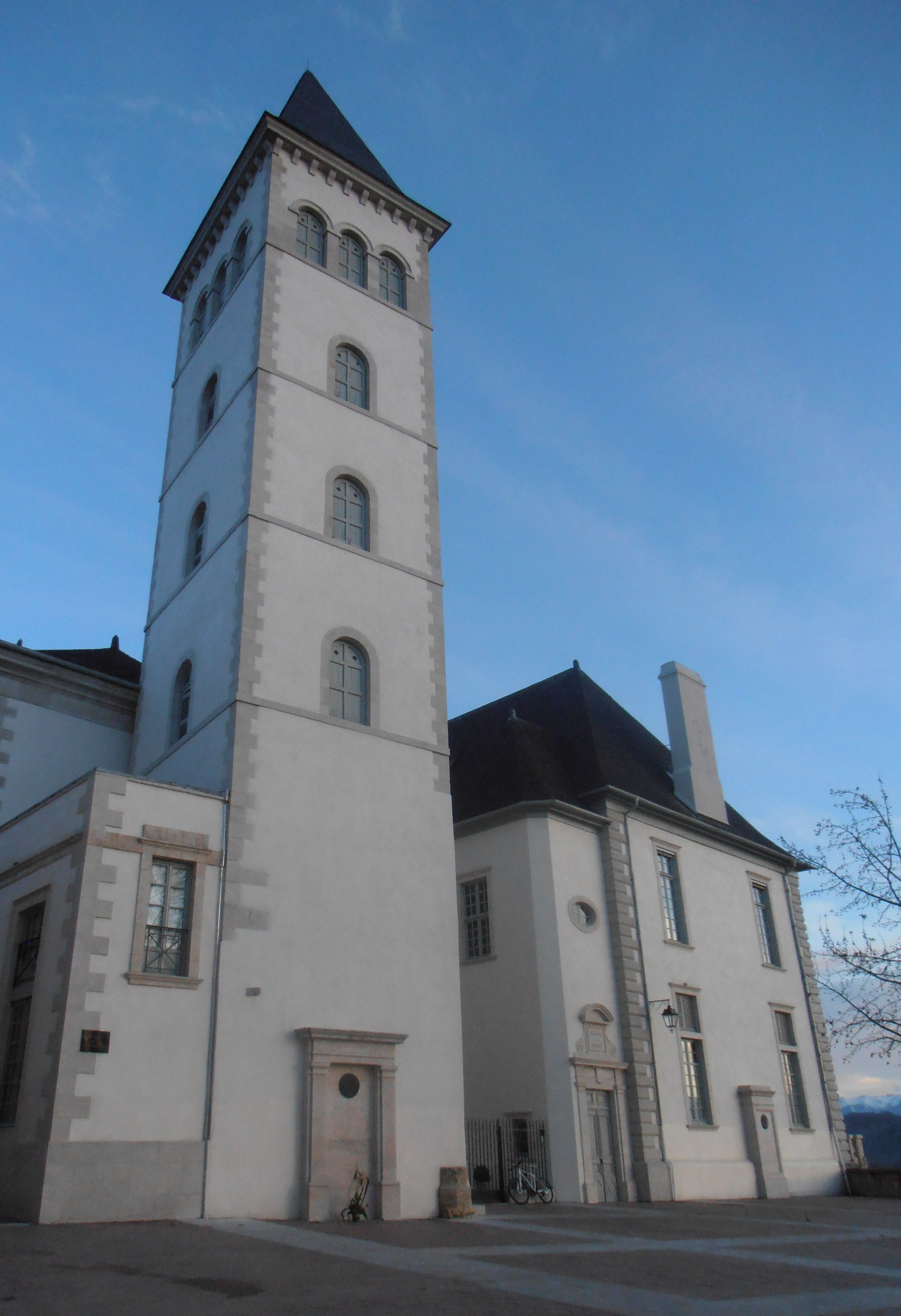 Le parlement de Navarre à Pau et la tour du Parlement